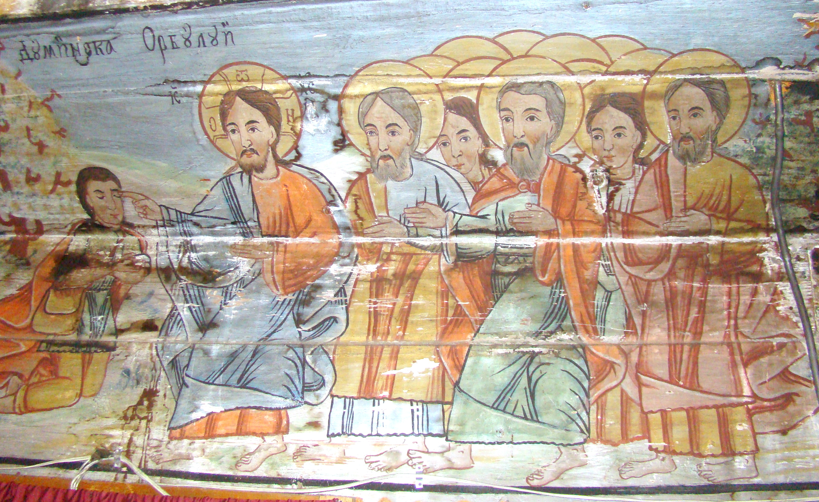 Urișiu de Jos, Mureș